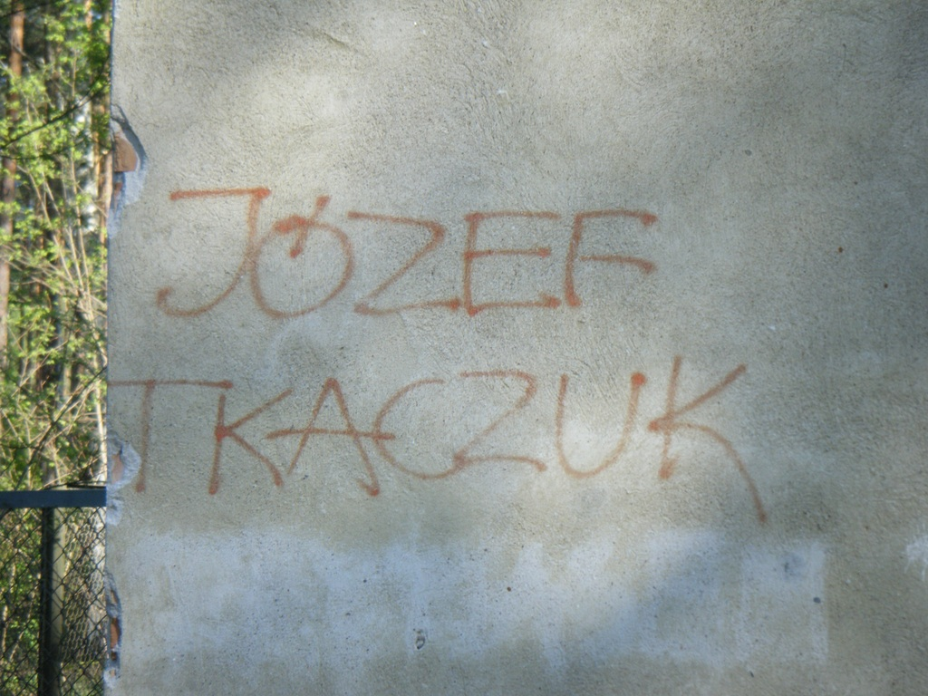 Podpis "Józefa Tkaczuka" na murze w Loretto (województwo mazowieckie).